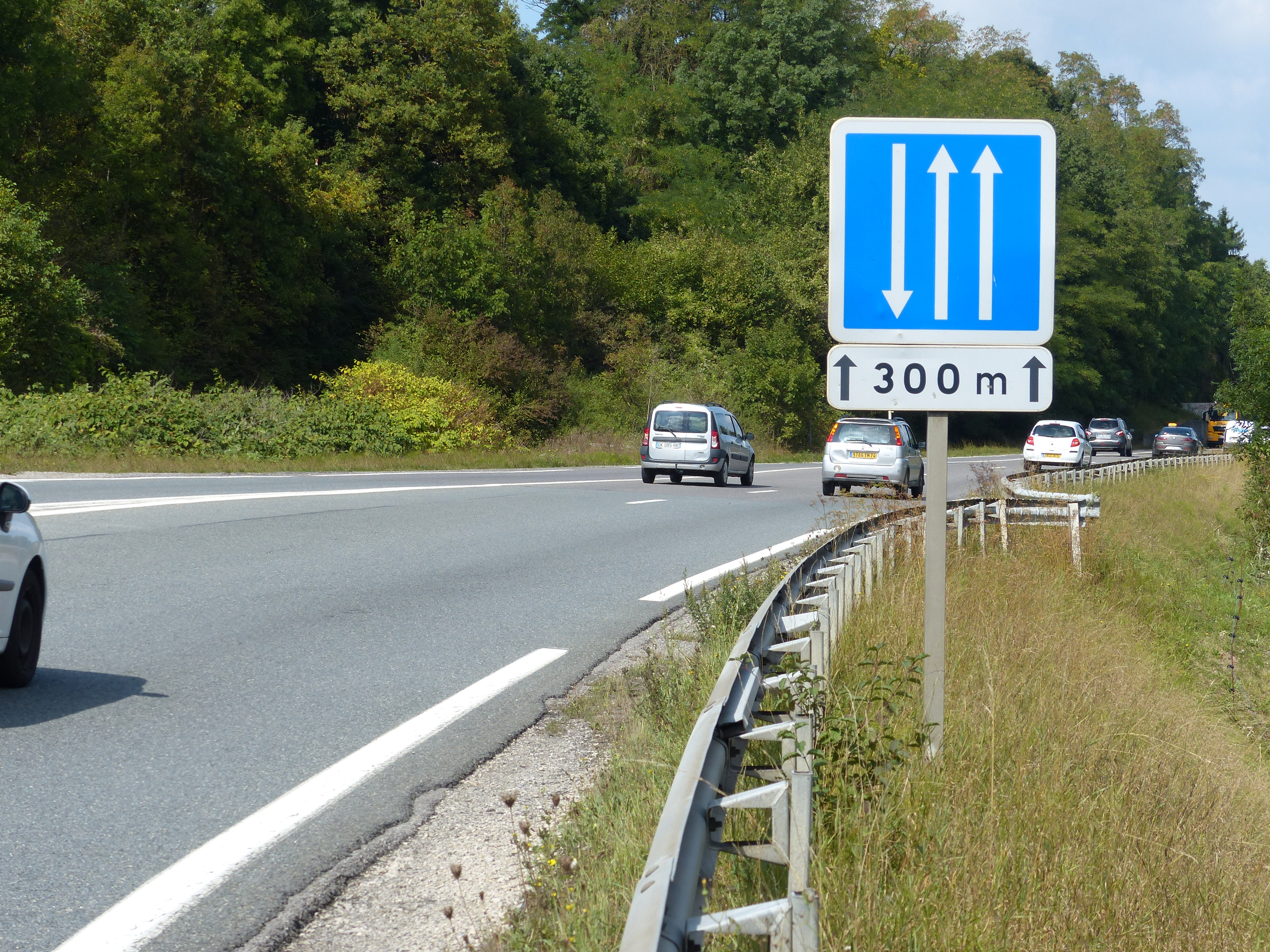 Panneau C29b et panonceau M2, sur la D903 en Haute-Savoie, France.